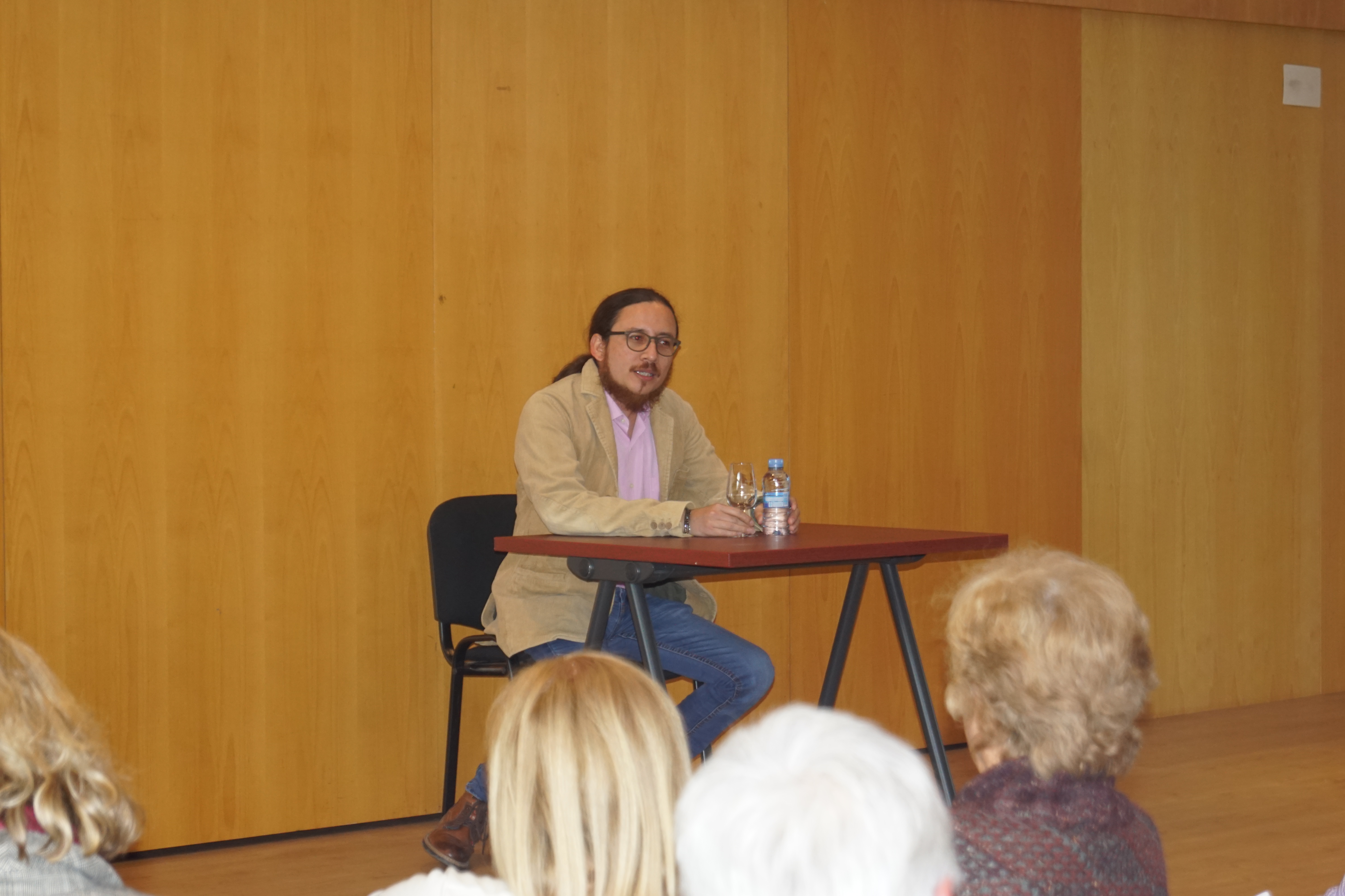 Milthon Robles dando una conferencia en Alella